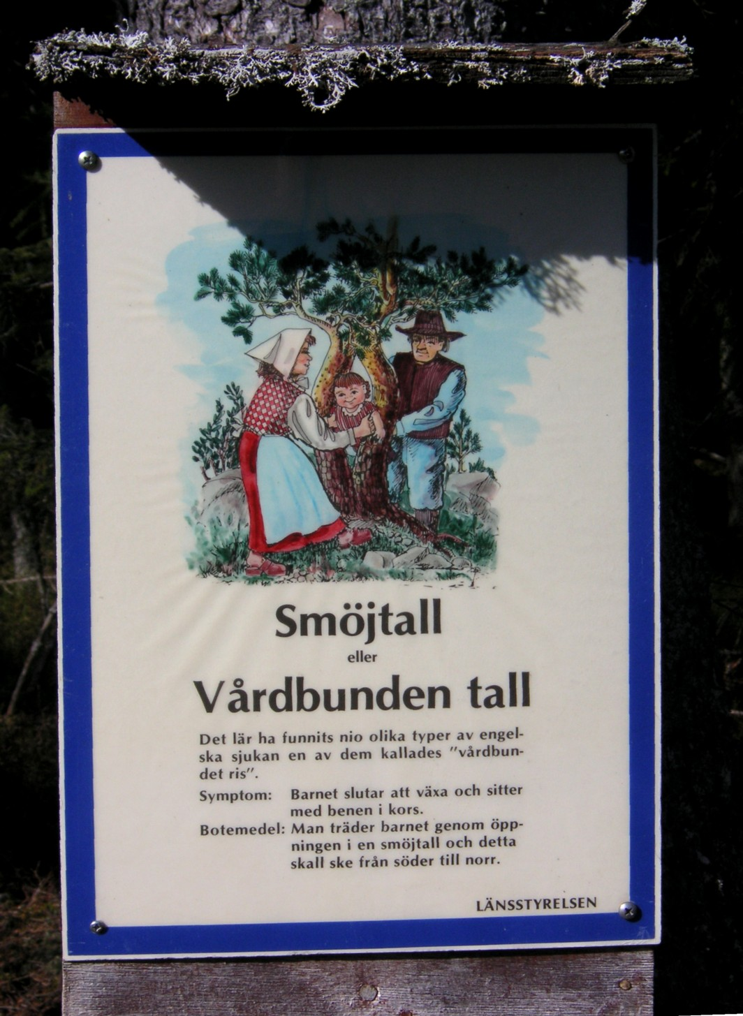 Smöjtall i Dalarna, skylt